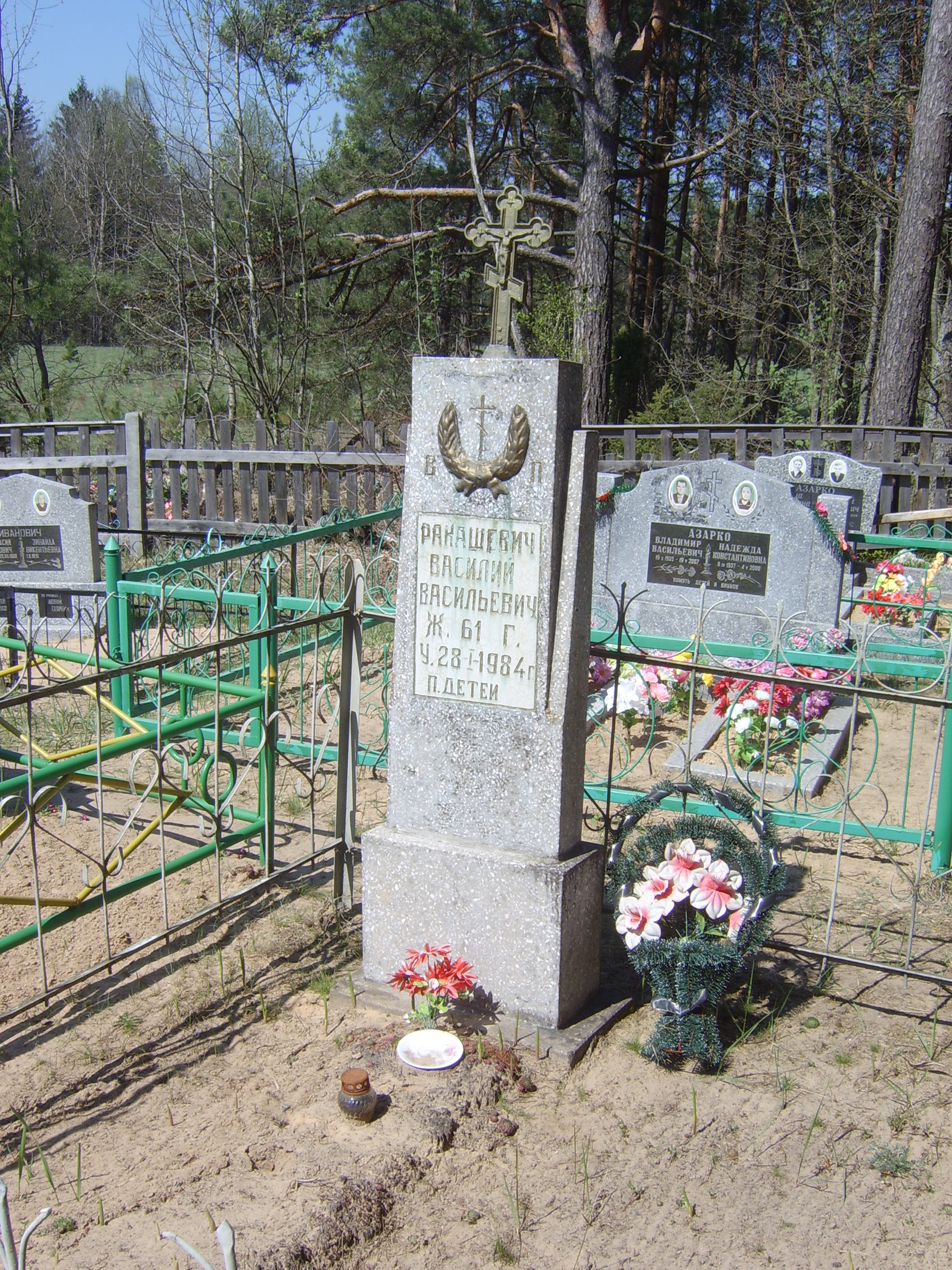 Беларуская (тарашкевіца): Магіла Васіля Ракашэвіча, могілкі ля в. Хацяж